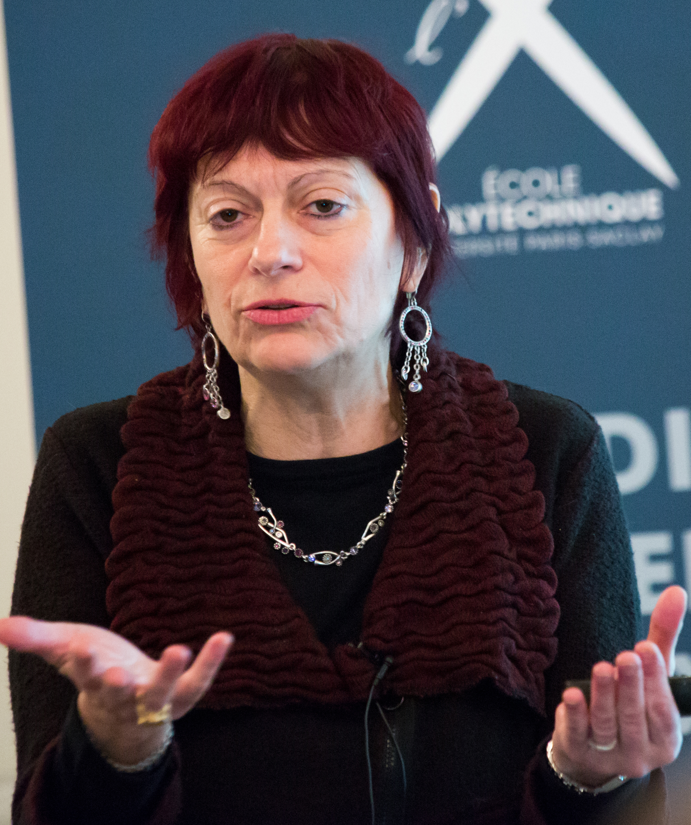 « Modélisation mathématique de la biodiversité :une contribution à la compréhension de l’évolution du vivant » Sylvie Méléard - Professeur à l’École polytechnique, Chercheur au Centre de Mathématiques Appliquées de l’École polytechnique / CNRS, Porteur de la Chaire Veolia « Modélisation Mathématique et Biodiversité »